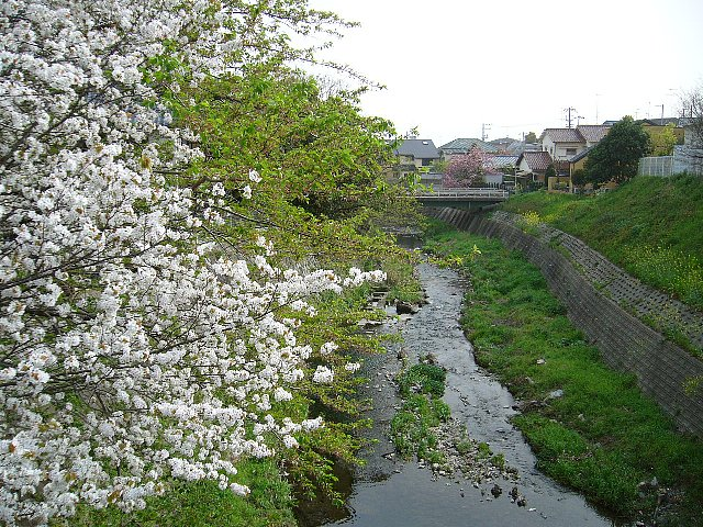 花盛りのja:箕面川 中央橋から南望